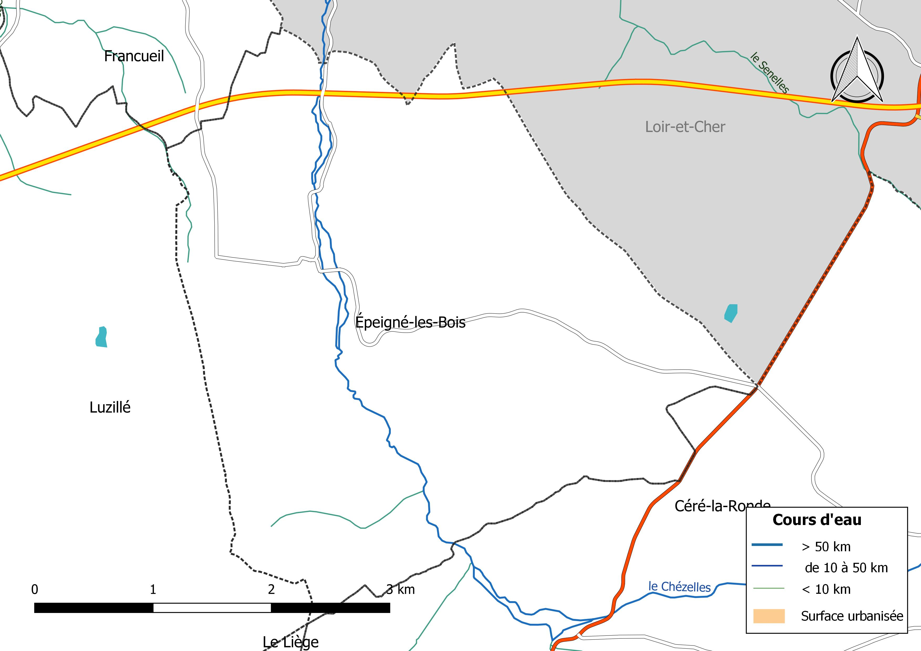 Carte du réseau hydrographique de la commune de Épeigné-les-Bois (France).